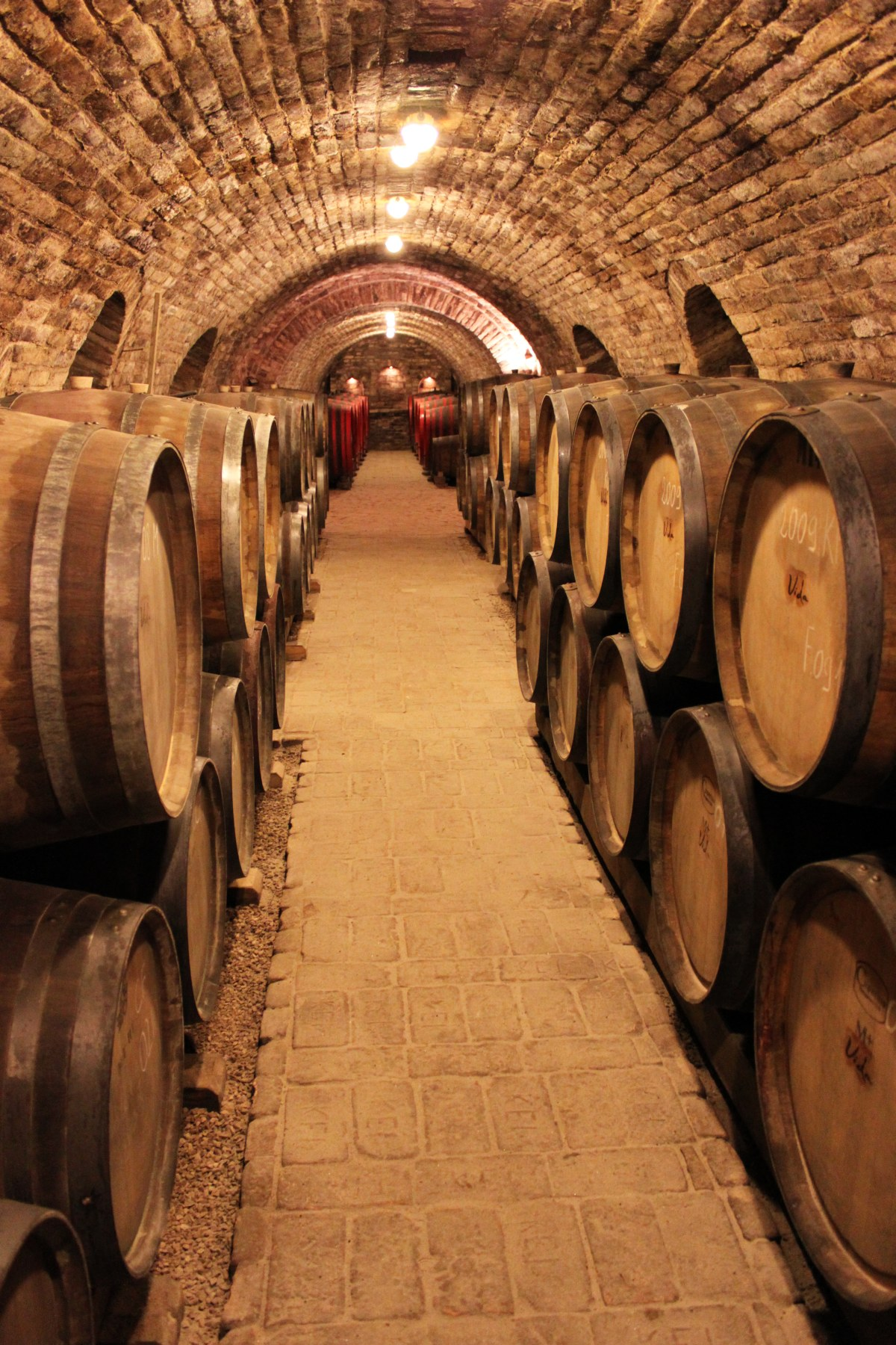 Vida Péter pincéje Szekszárdon